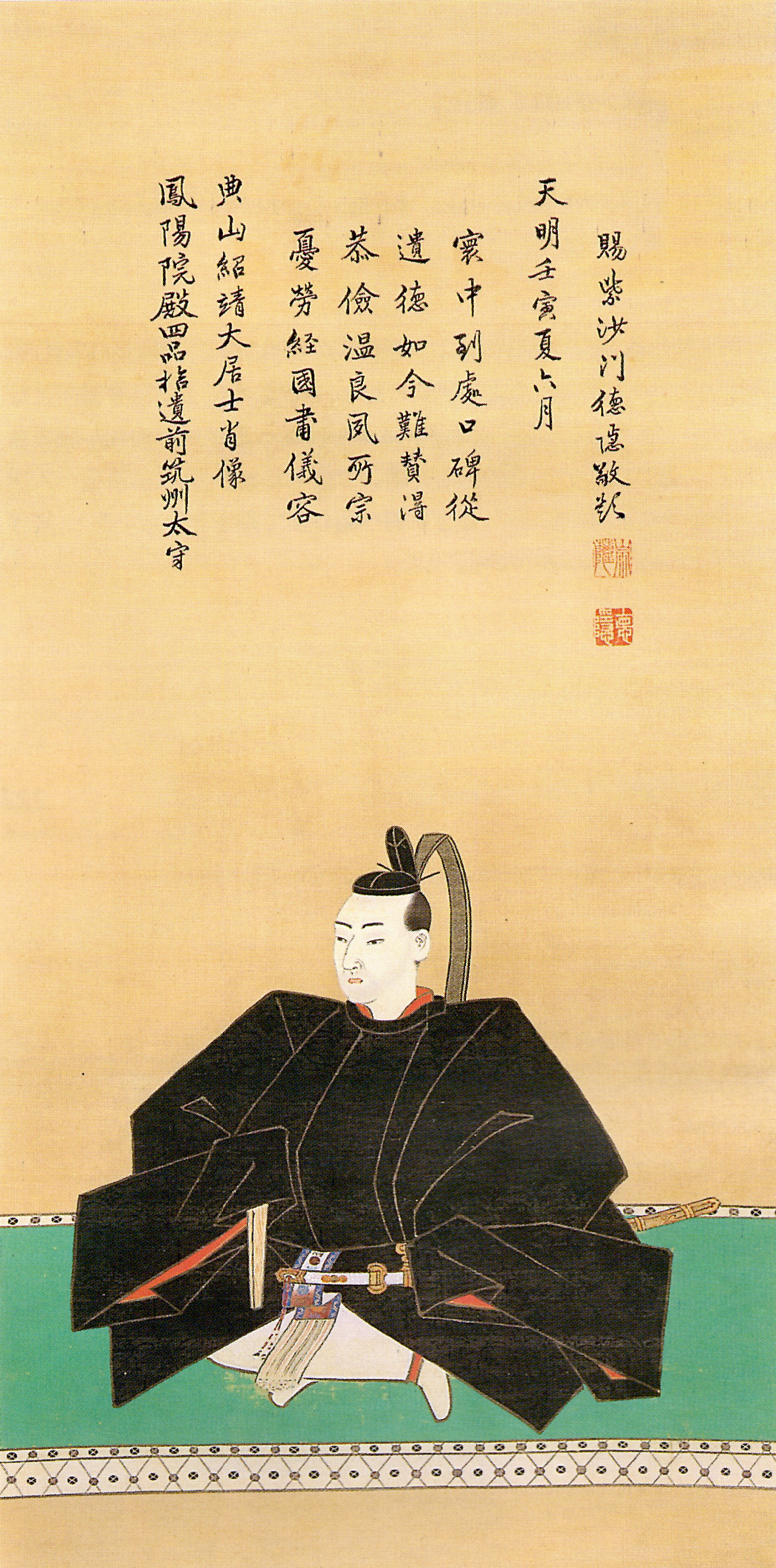 黒田治之の肖像。